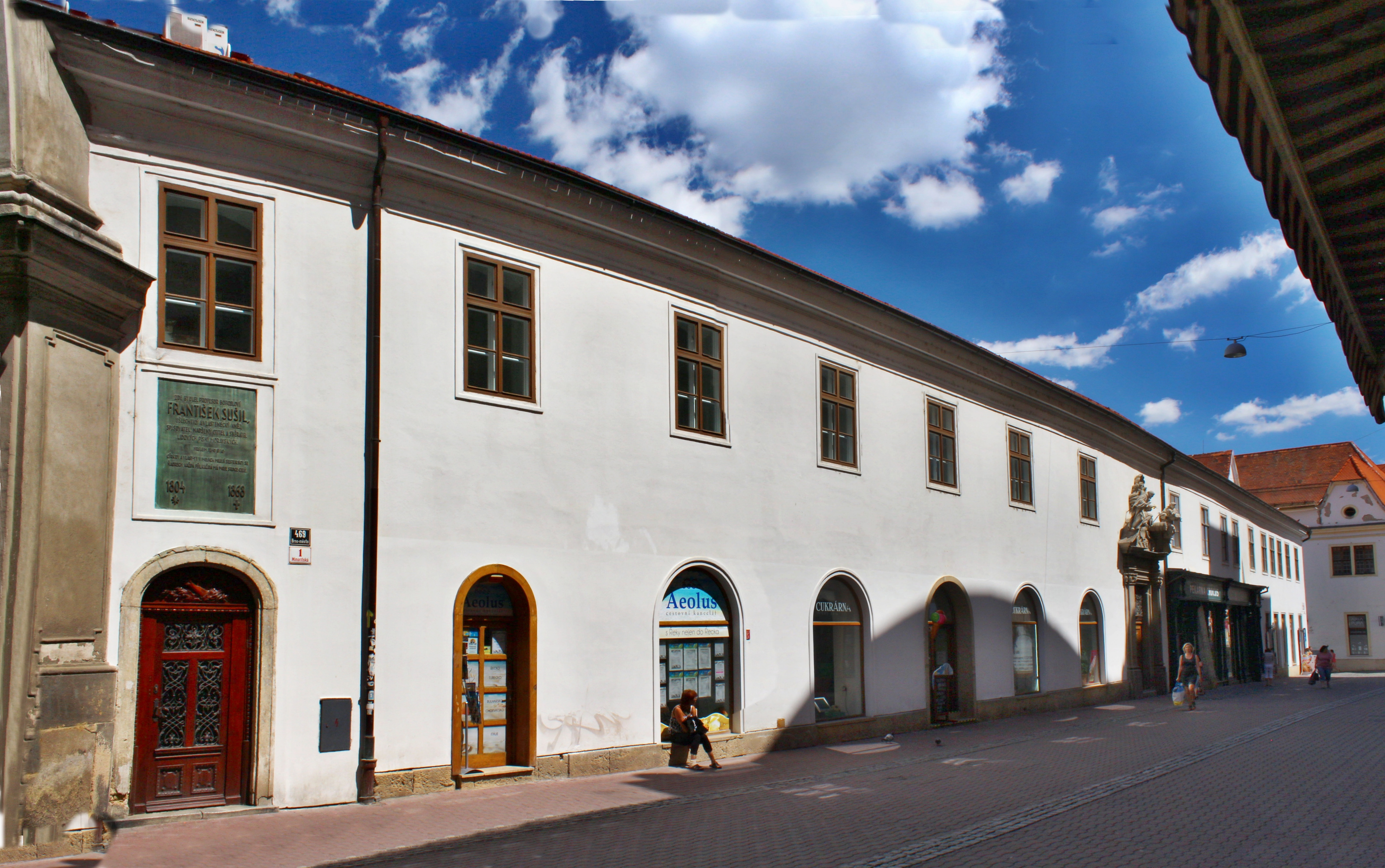 Minoritský klášter v Brně